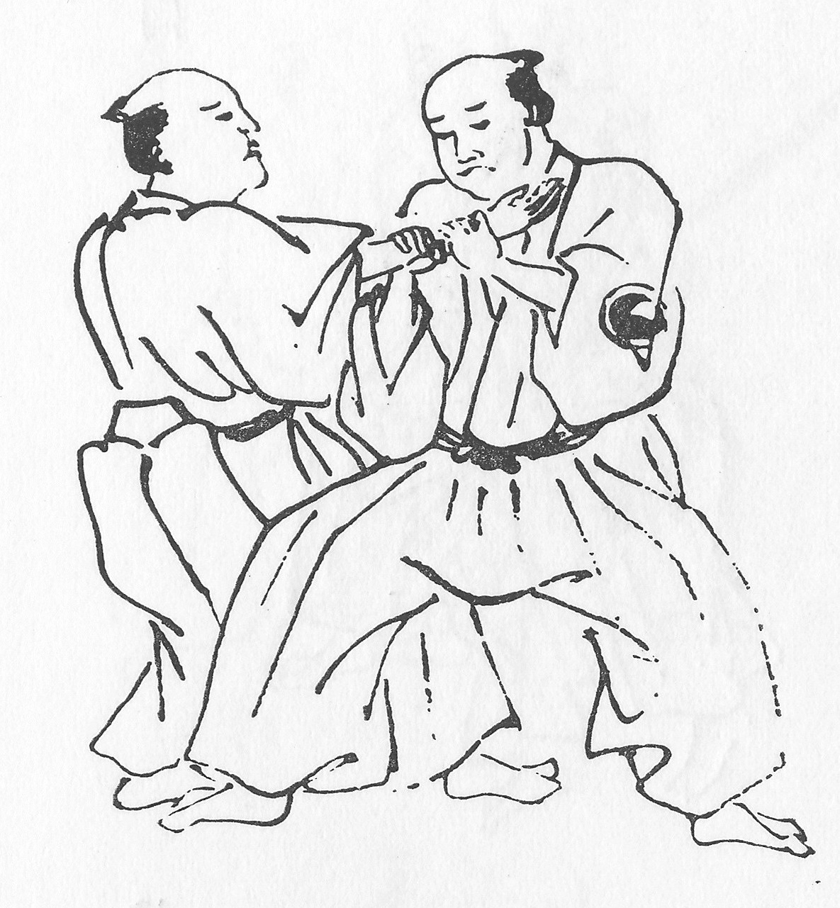 柔術の図画